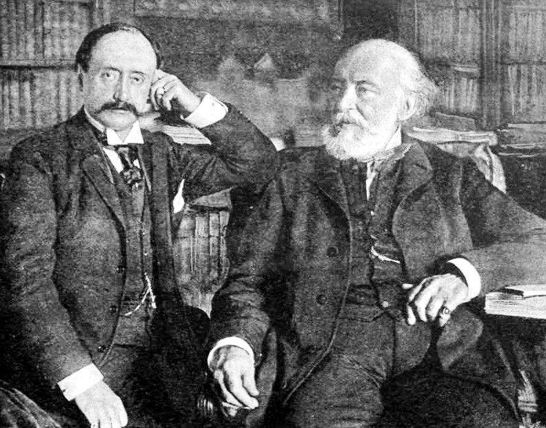 Kossuth Lajos és Kossuth Ferenc Turinban 1892-ben. Ellinger Ede fényképfelvétele